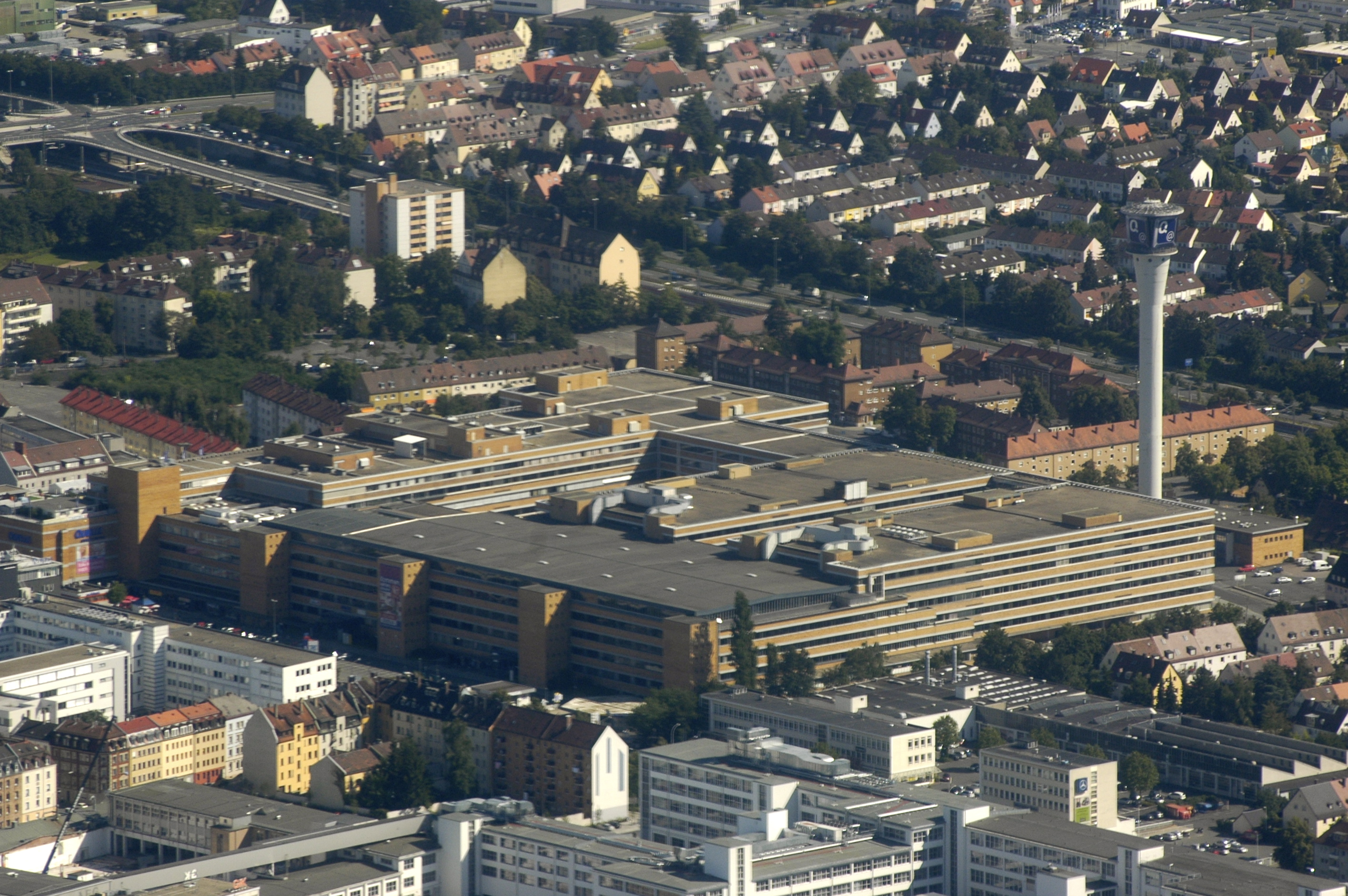 Quelle GmbH in Nürnberg